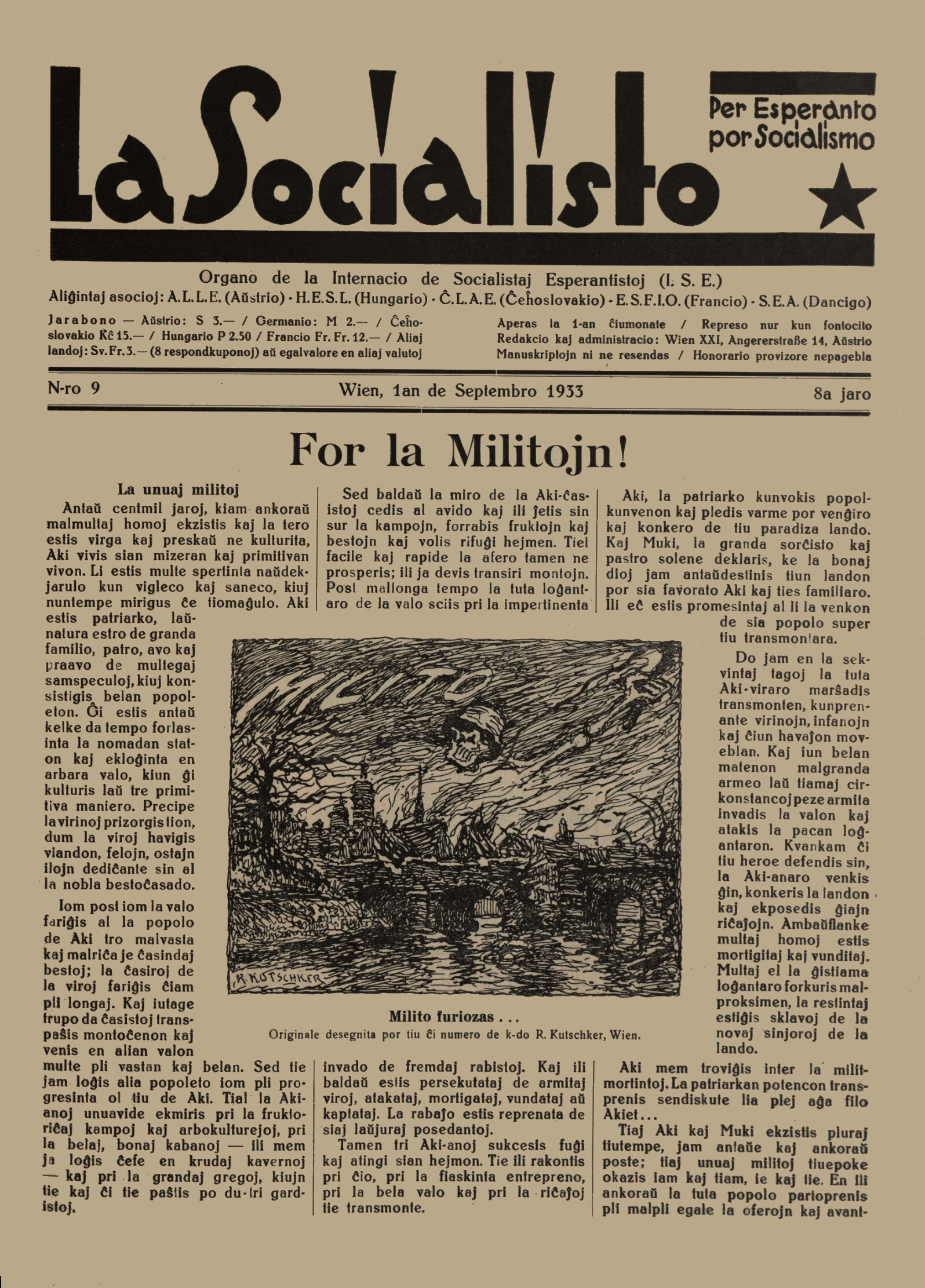 Ĉefartikolo de Hans Weinhengst kontraŭ la milito.